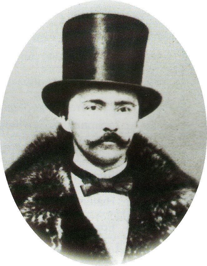 Фото Генриха Шлимана в 38 лет.